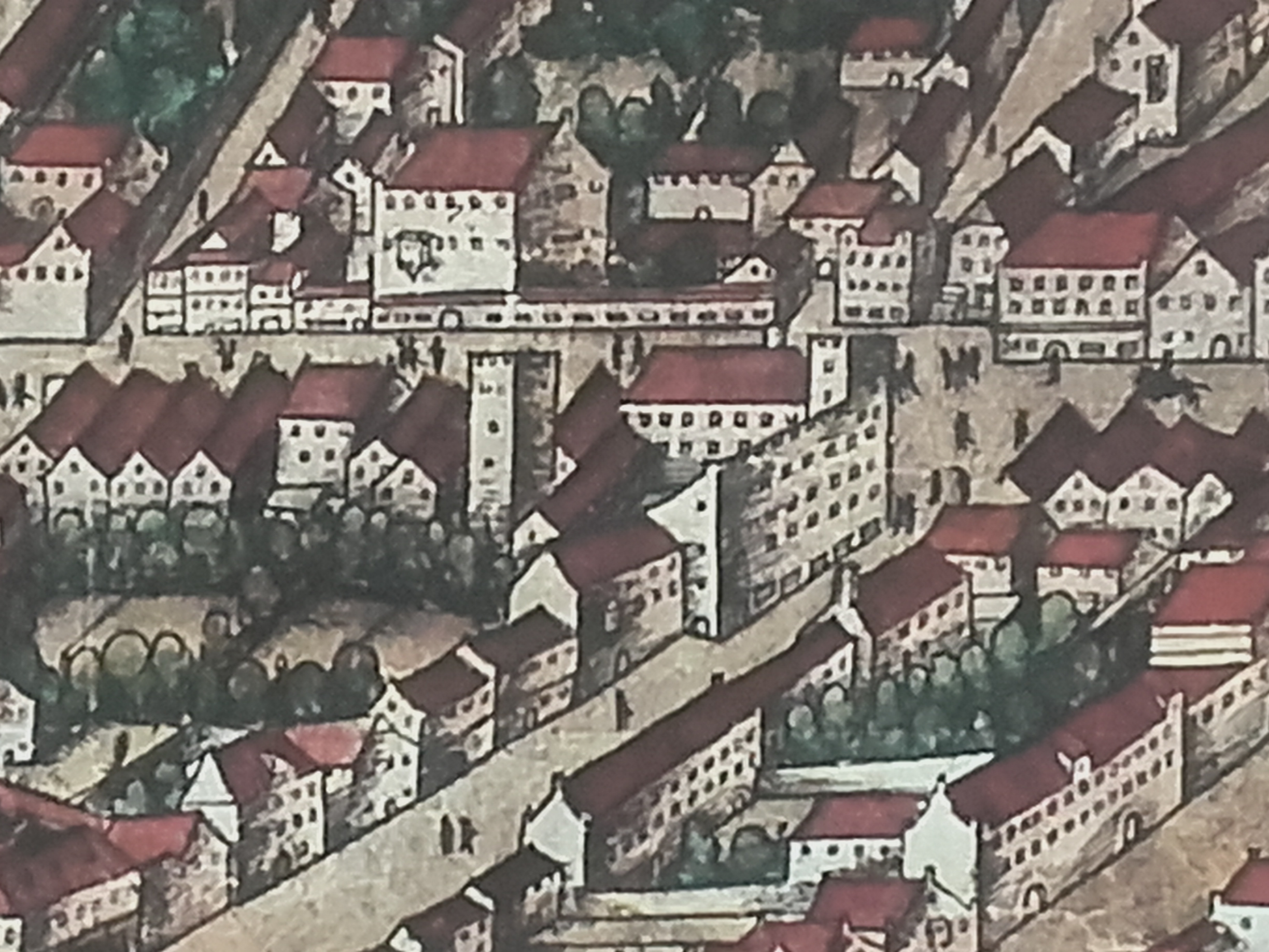 Ausschnitt aus dem Vogelschauplan von Jörg Seld